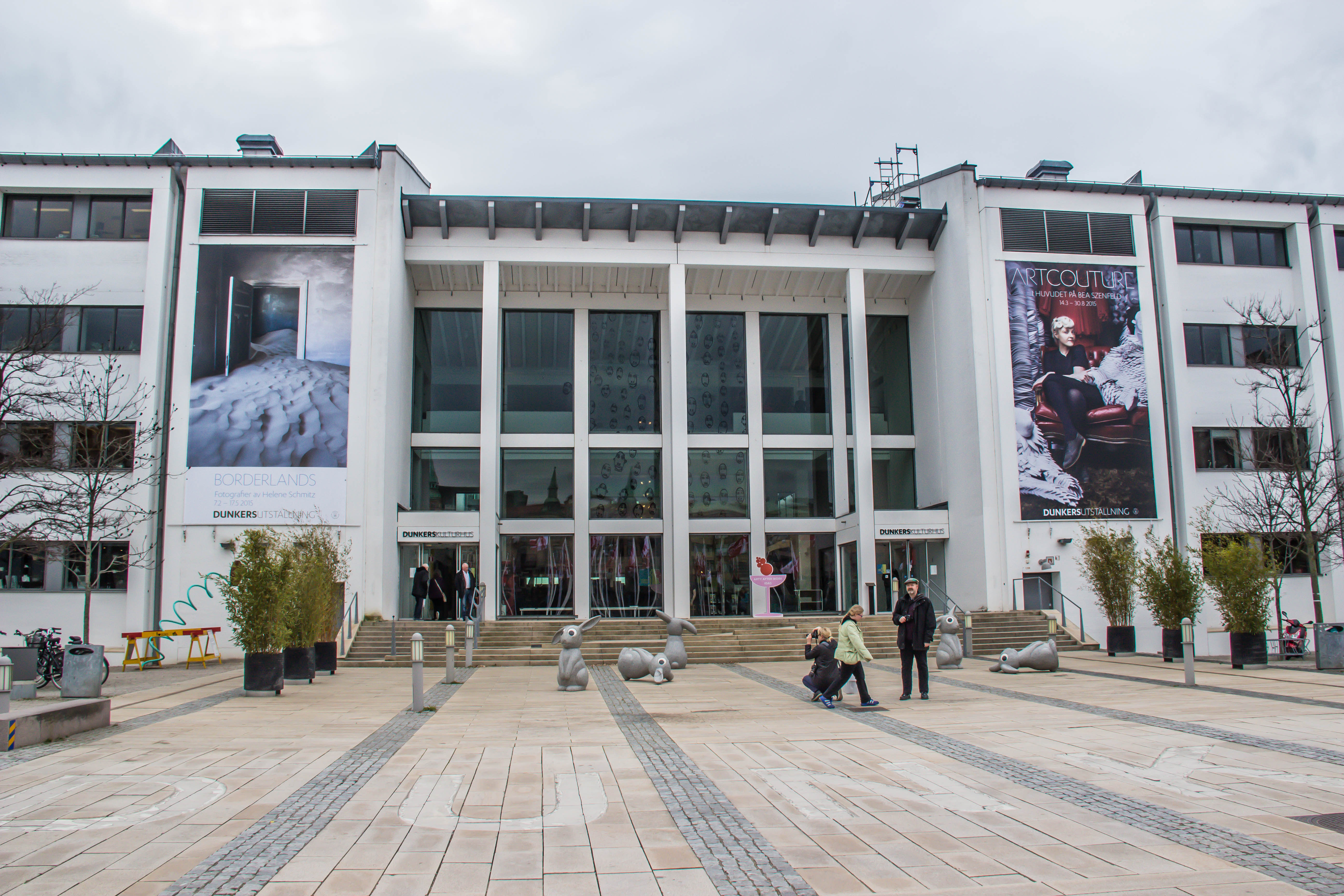 Dunkers